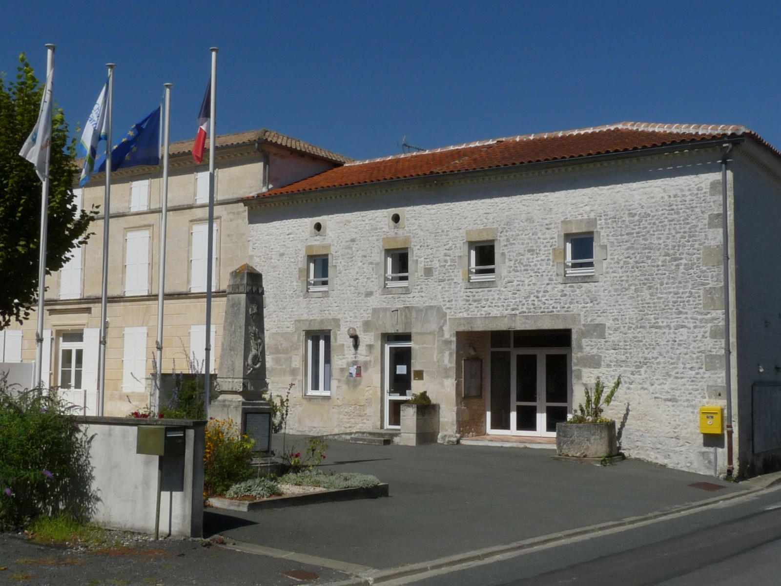 Mairie de St-Seurin-de-Palenne, Charente-Maritime, France